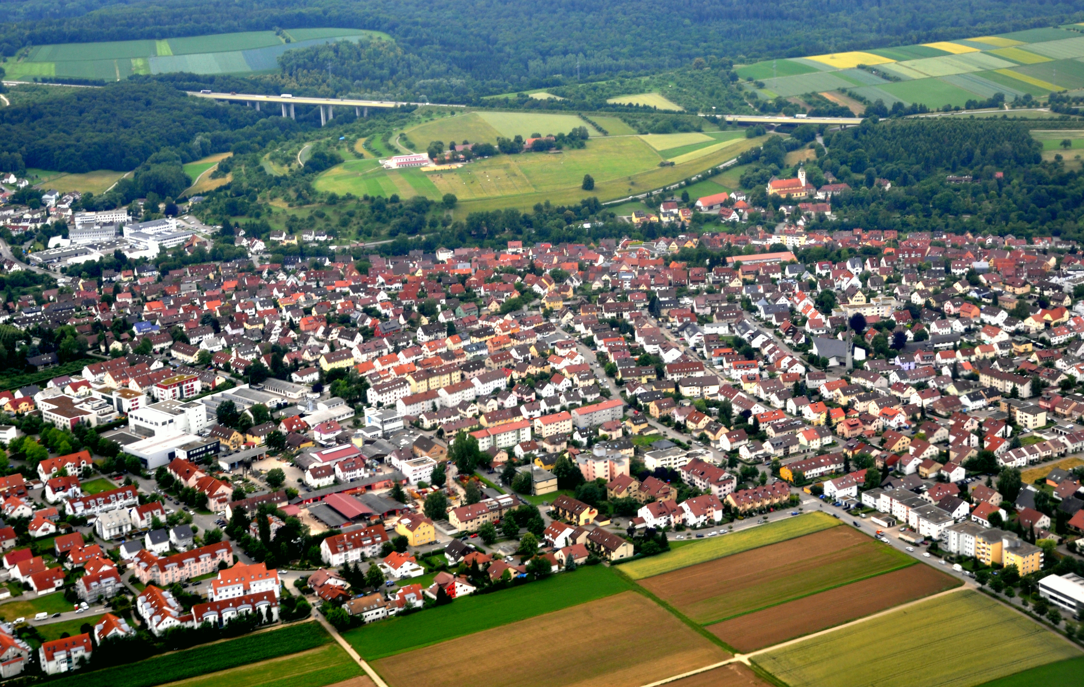 Denkendorf, Luftbild